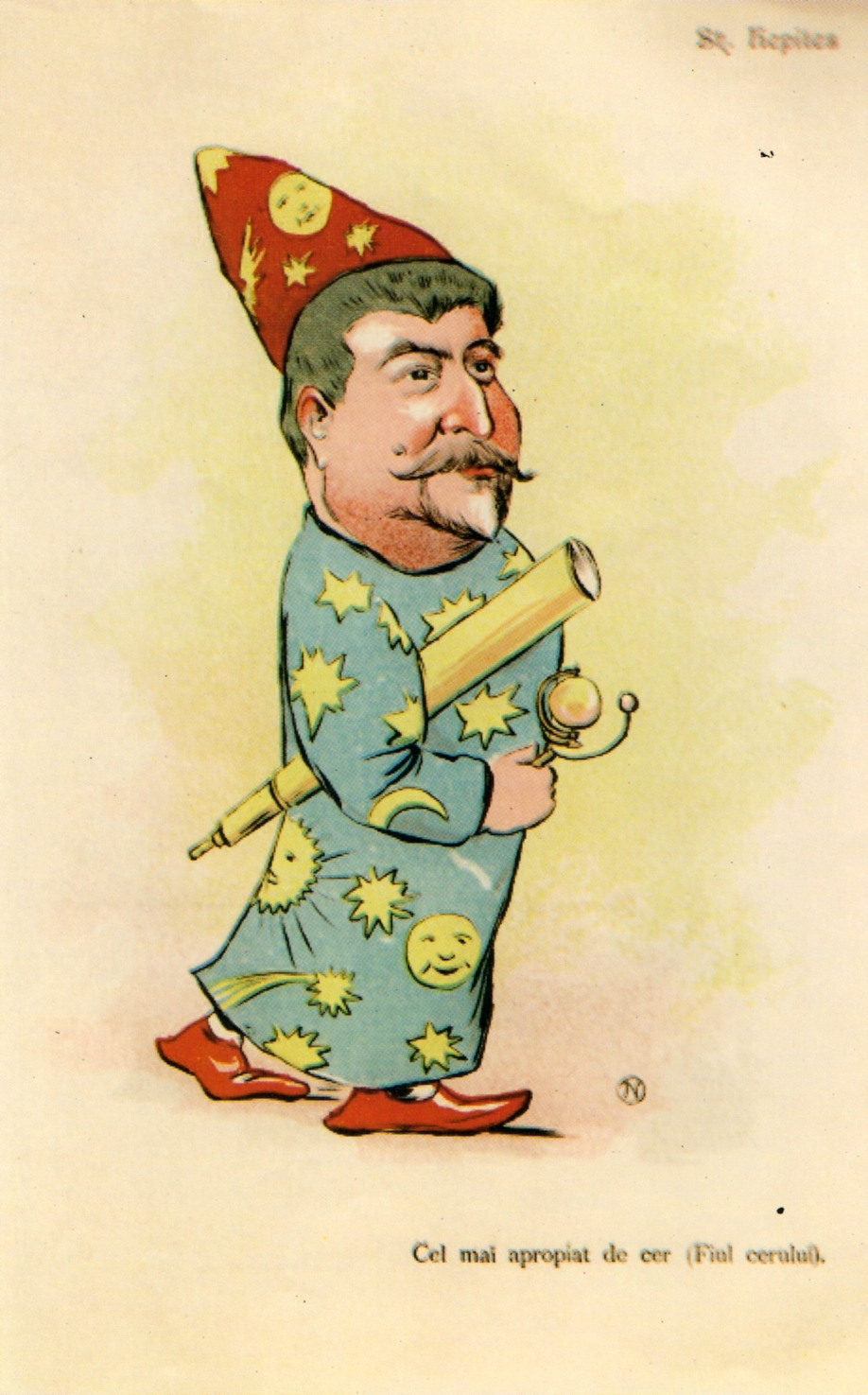 Ștefan Hepites (caricatură din Albumul Contemporani). Cel mai apropiat de cer (Fiul cerului)